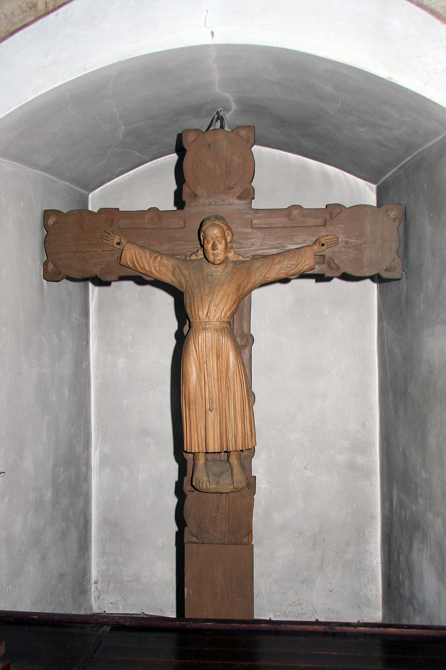 Überarbeitete St. Wilgefortis-Darstellung aus dem 12. Jahrhundert